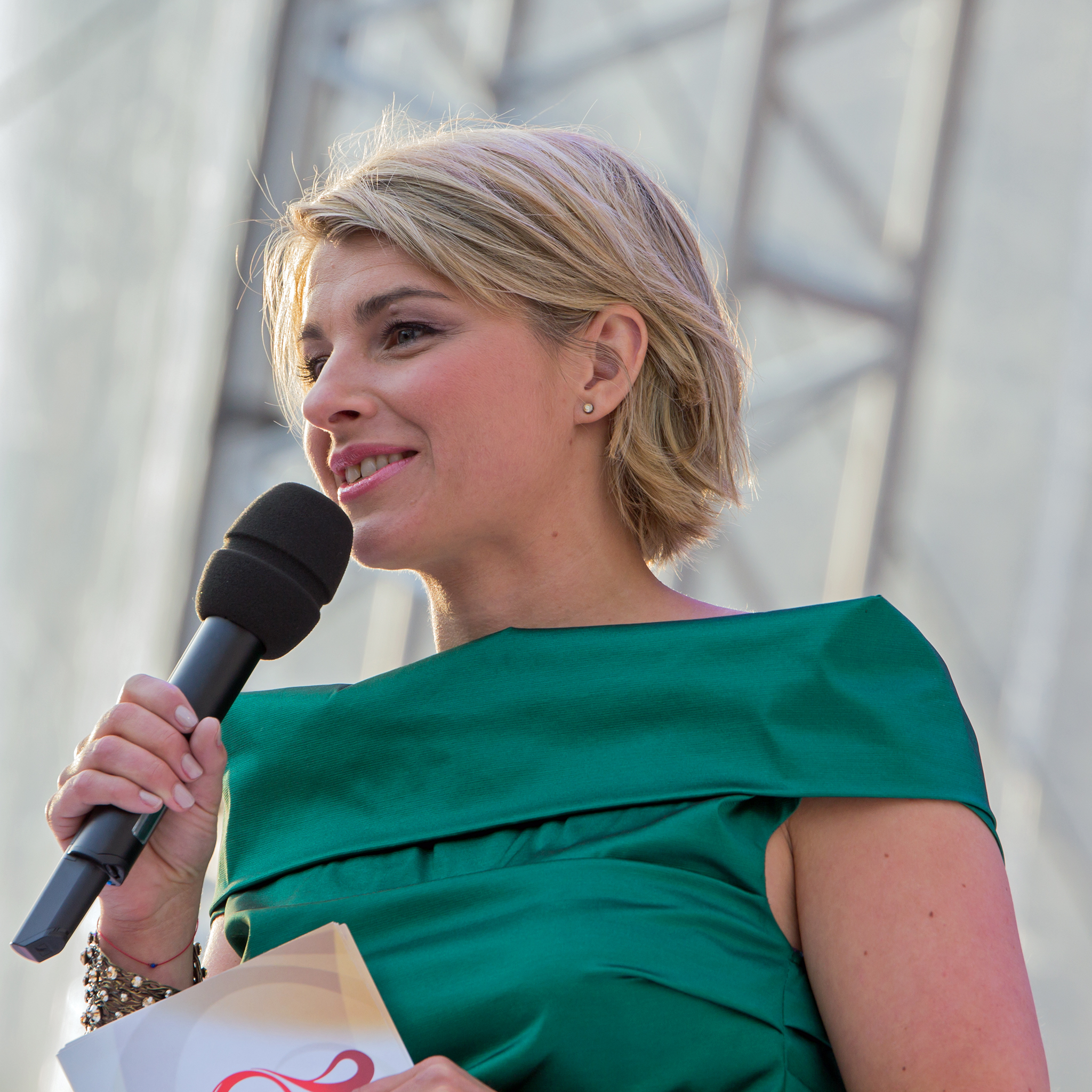 Sabine Heinrich beim Finale zu Eurovision Young Musicians 2014